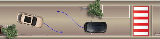 disassamento schematico